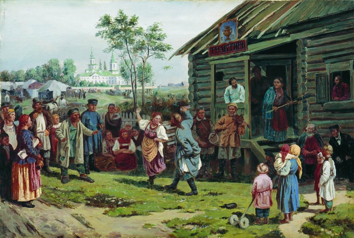 Илларион Прянишников. "Сельский праздник", 1870-е гг. Холст, масло. 42х62 см. Иркутский областной художественный музей